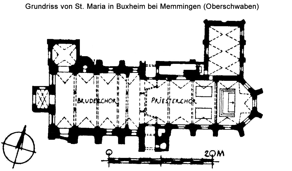 Grundriß der ehemaligen Klosterkirche St. Maria im oberschwäbischen Buxheim